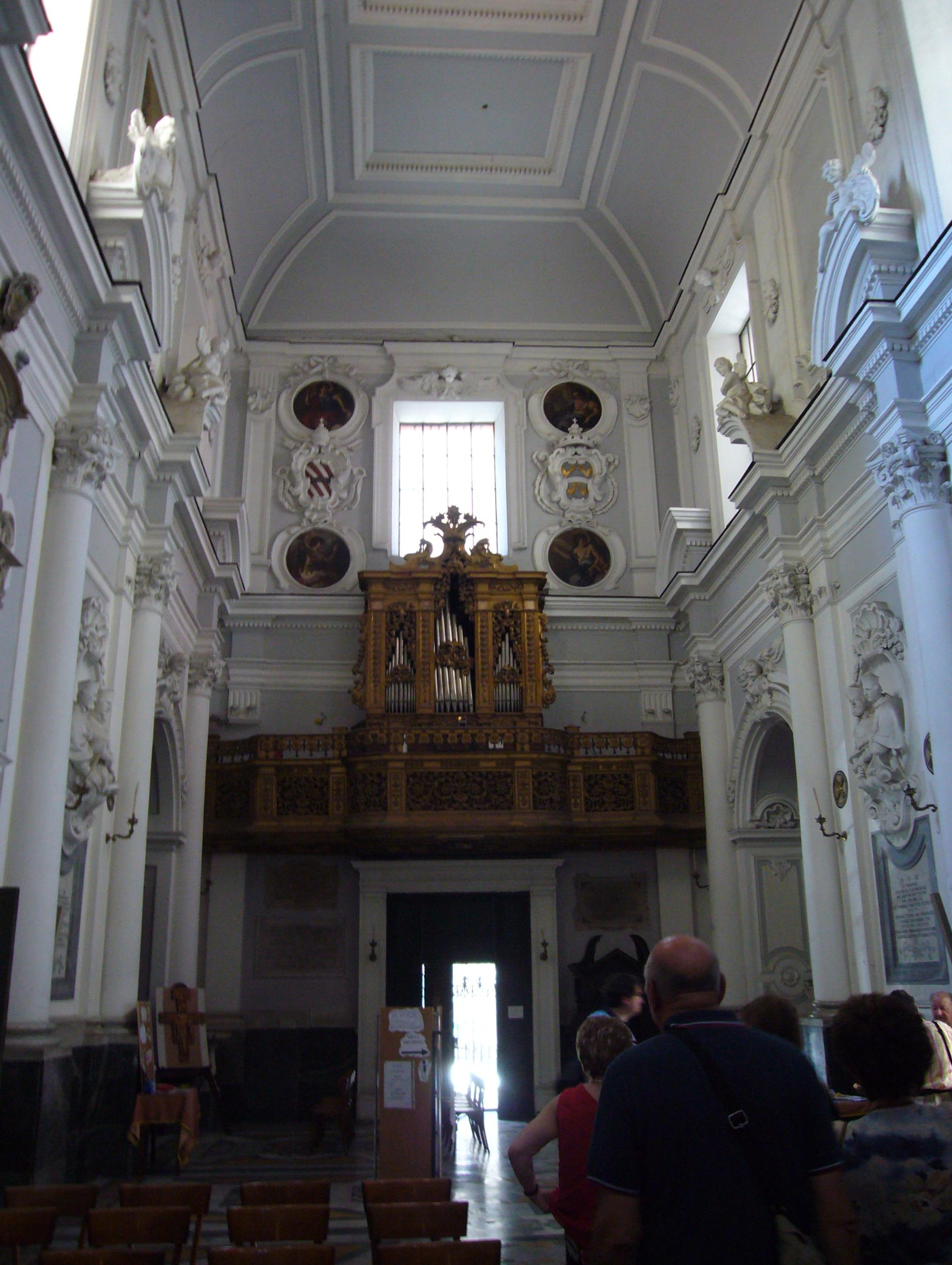 Napoli, Sant'Angelo a Nilo: interno dall'altare